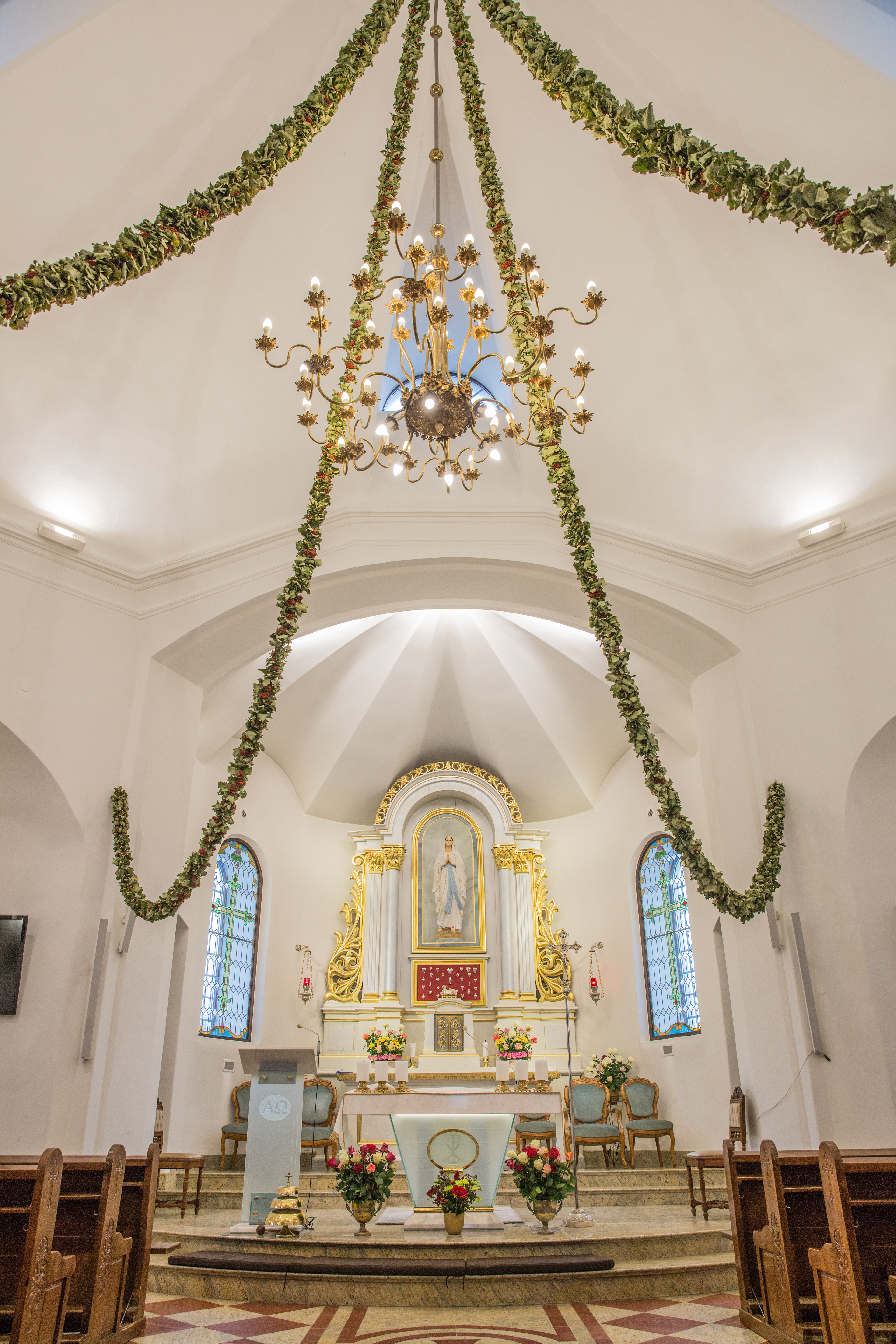 Telšių Švč. Mergelės ėmimo į dangų bažnyčios vidus